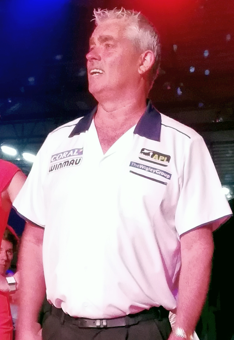 Steve Beaton at Dutch Darts Masters 2018